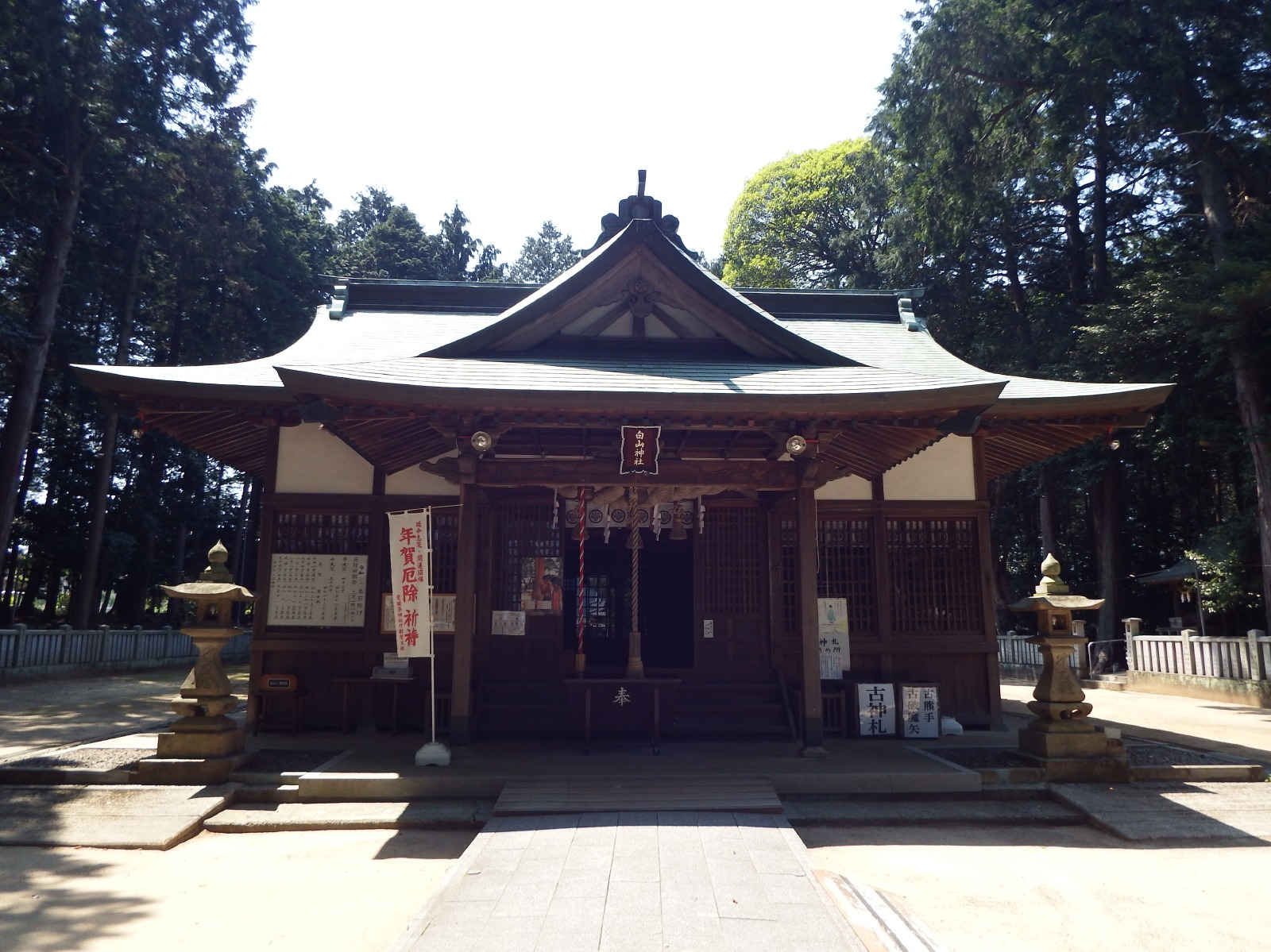 白山神社の本殿拝殿